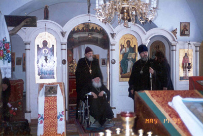 В мае 1995 года, за несколько месяцев до своей кончины, Суздаль посетил епископ Григорий (Граббе) - чтобы благословить самостоятельное бытие Российской Церкви.